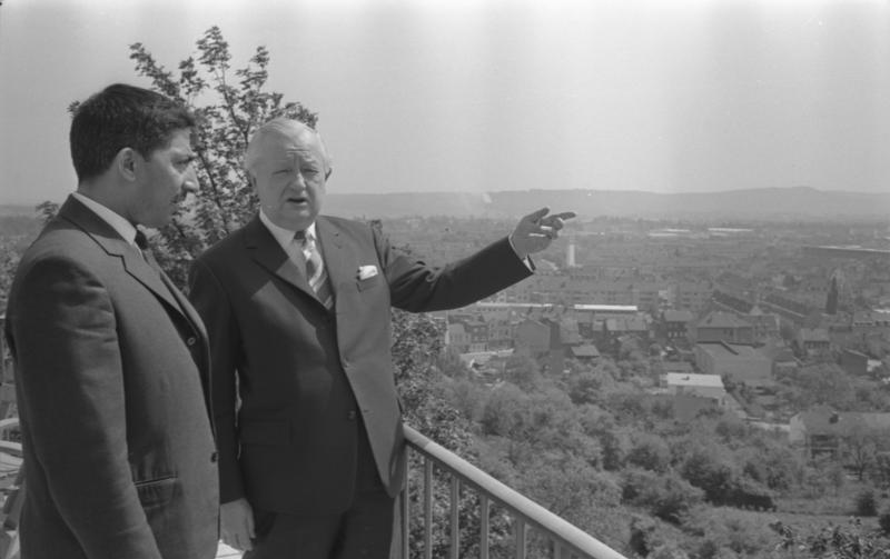 Sts. Prof. Bülow empfängt den kgl.-afghan. [königlich-afghanischen] Staatssekretär im BM Justiz Kamawi